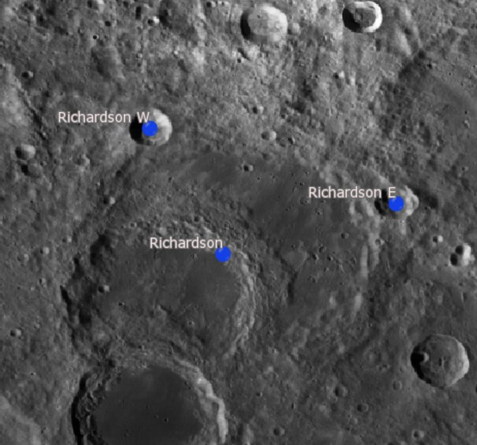 Cráter lunar Richardson. Cráteres satélite. (Imagen LRO)